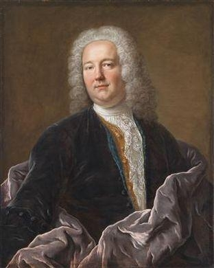 Nicolas Prosper Bauyn d’Angervilliers (1675-1740) - francuski urzędnik,polityk, sekretarz do spraw wojny.